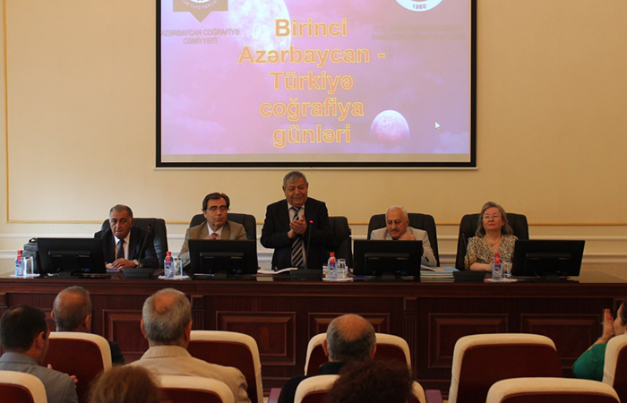 Birinci Azərbaycan və Türkiyə coğrafiya günləri